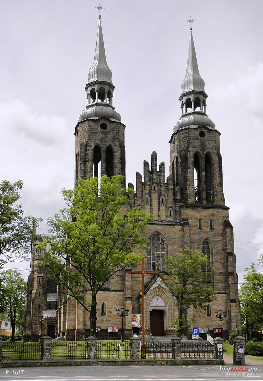 Kościół Najświętszego Serca Jezusowego w Skarżysku-Kamiennej (tzw. duży kościół)